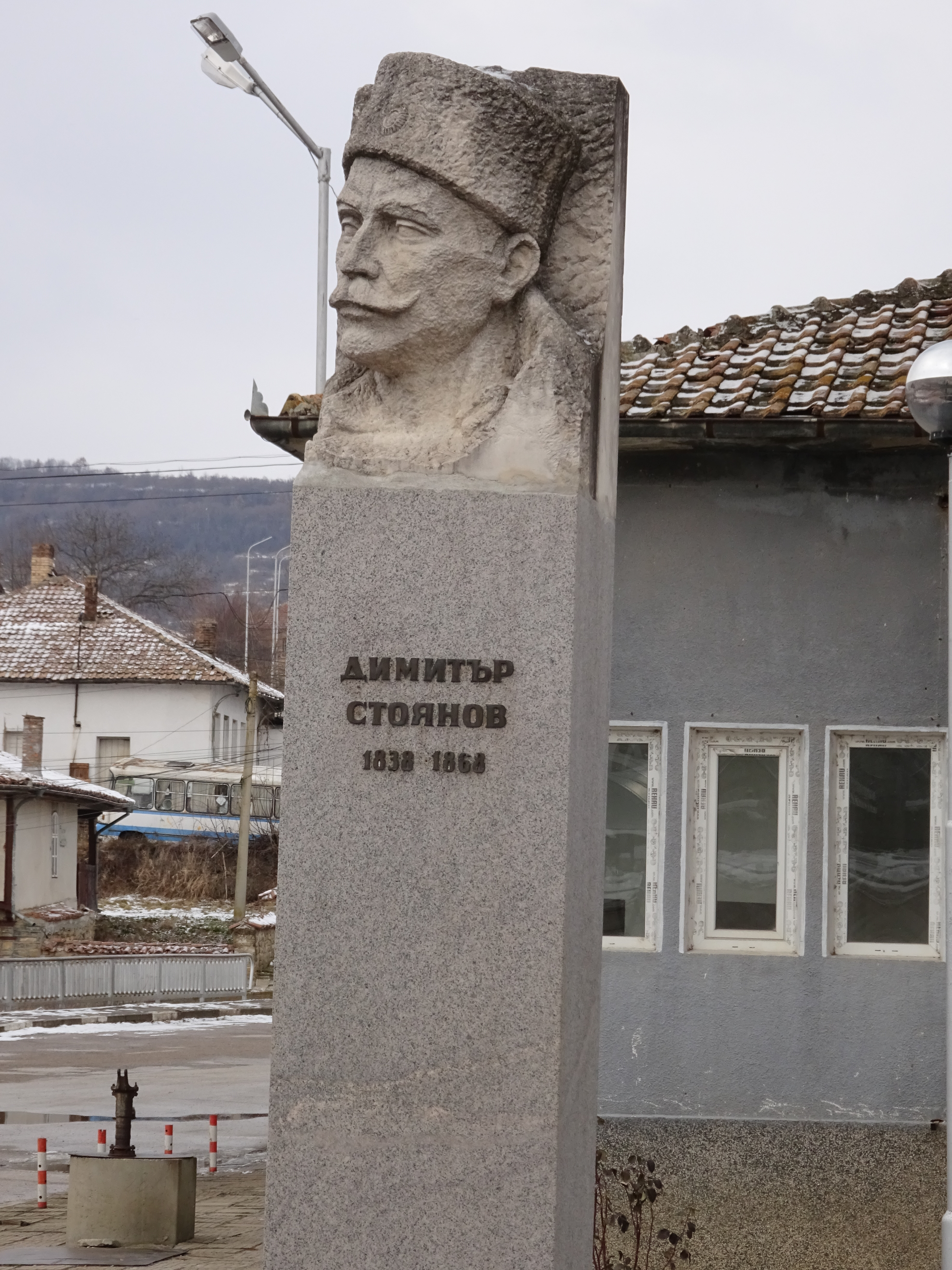 Паметник на Димитър Стоянов, с. Церова Кория, Велико Търновско